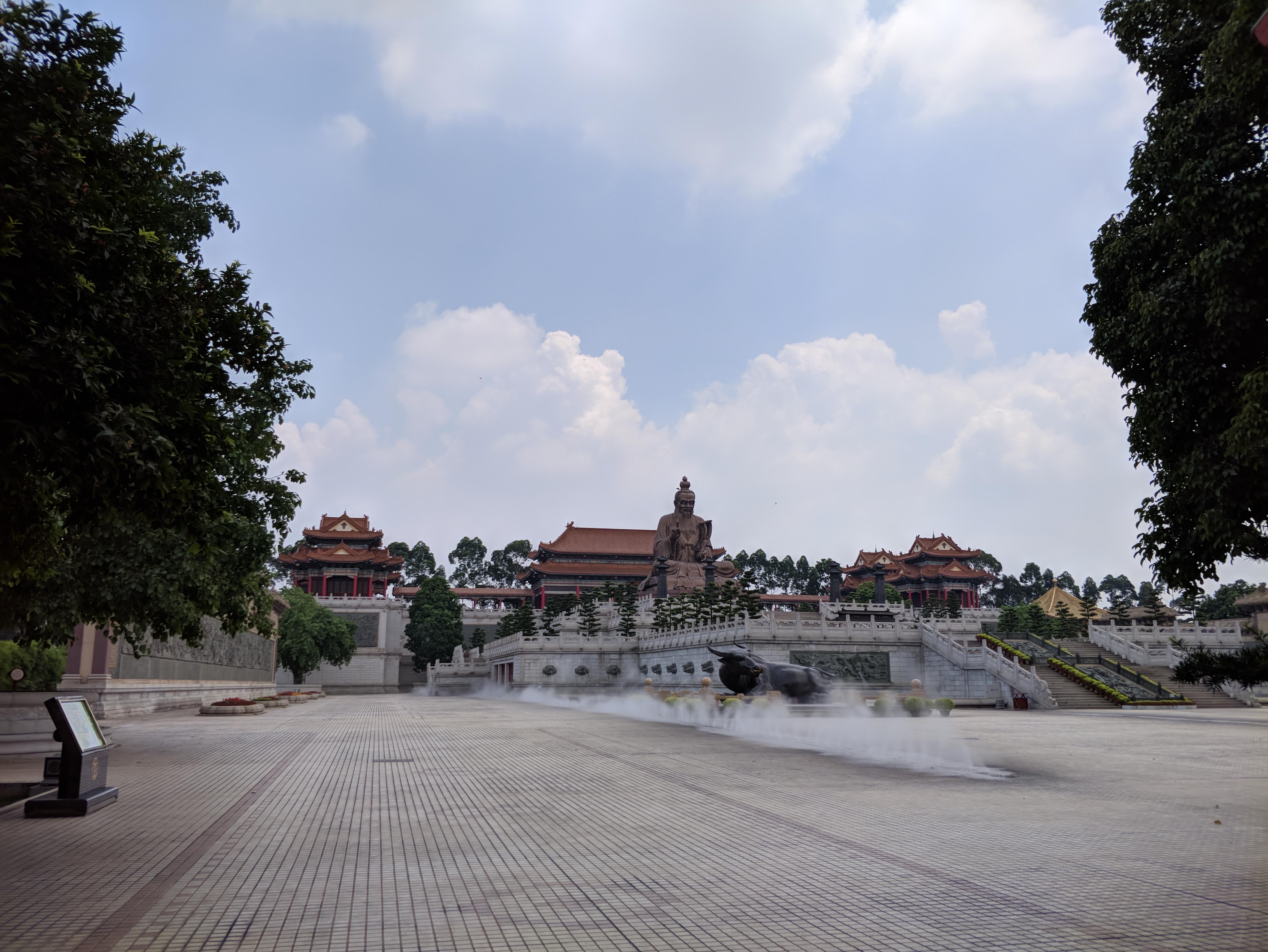 中文（中国大陆）: 广州市花都区圆玄道观内, 园内主体建筑物"三清殿"及其前方的中国道家创始人"老子"雕像.游览于广州花都圆玄道观景区内时所拍, 拍摄设备为手机.